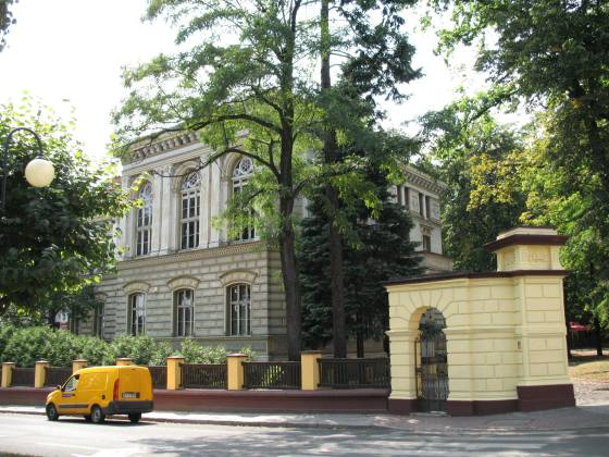 Głubczyce - UMiG